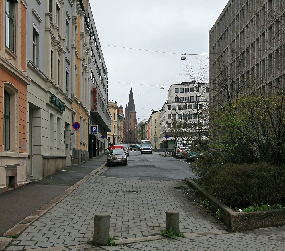 St. Olavs gate, Oslo, sett fra Pilestredet mot St. Olavs kirke